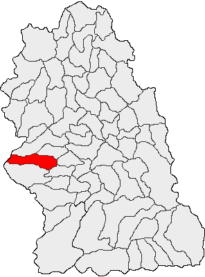 Categorie:Hărţi ale judeţului Hunedoara